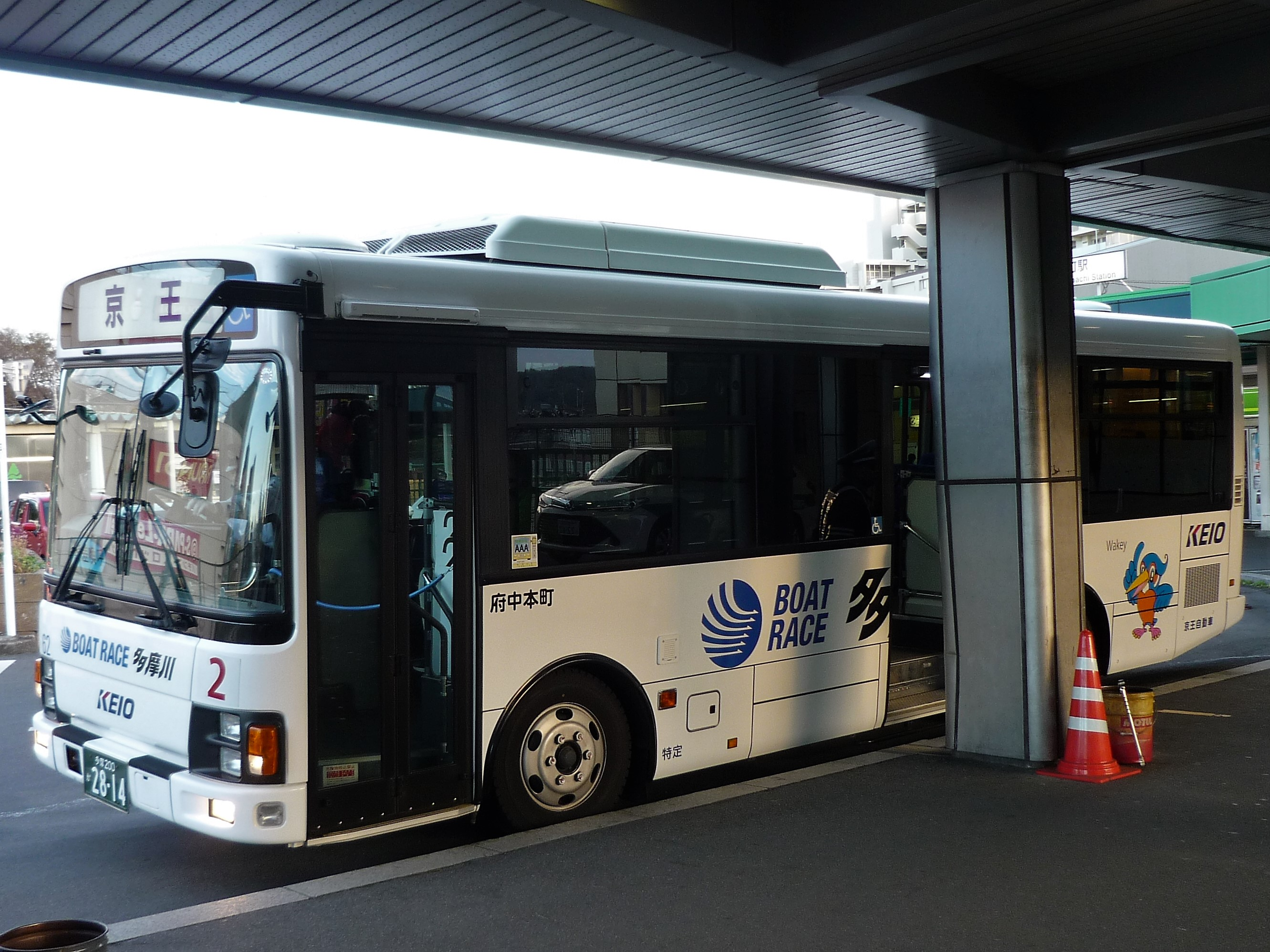 府中本町駅前に停車中の多摩川競艇バス Panasonic Lumix DMC-FS3